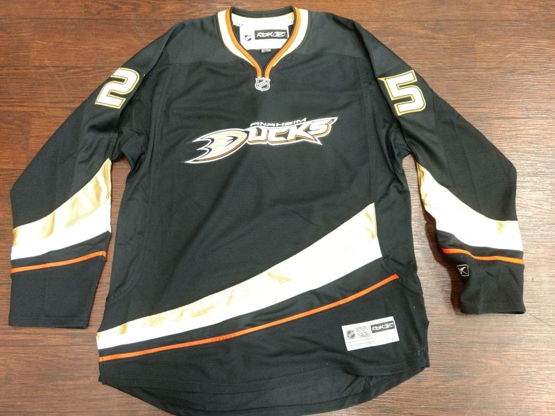 アナハイムダックスホームゲームジャージ(2代目)。アウェイ用はベース色が白に変わる。2013-2014シーズンまで使用。